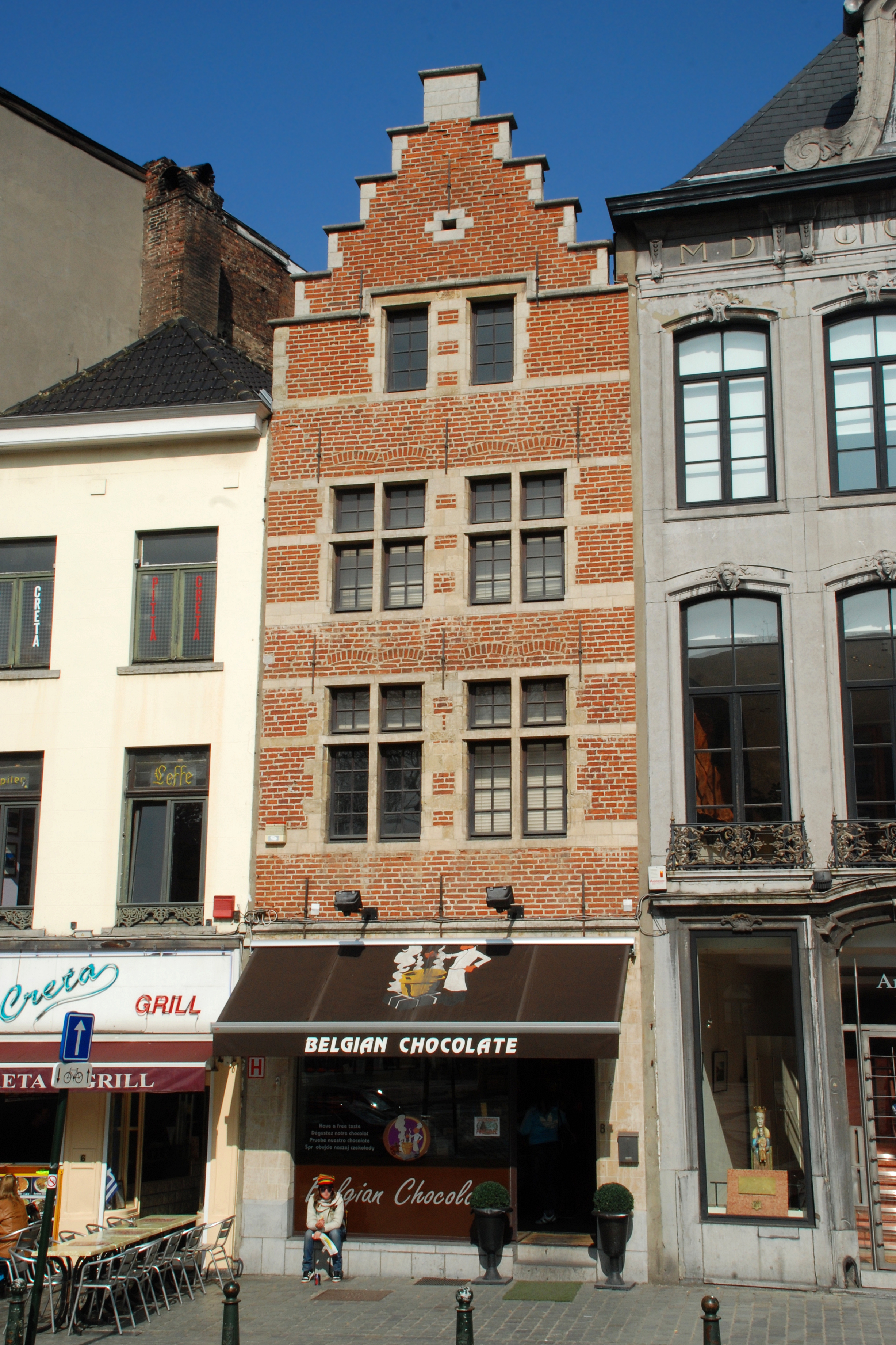 Belgique - Bruxelles - Rue de la Montagne n°8